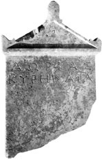 stèle funéraire de Doria découverte à Erétrie.